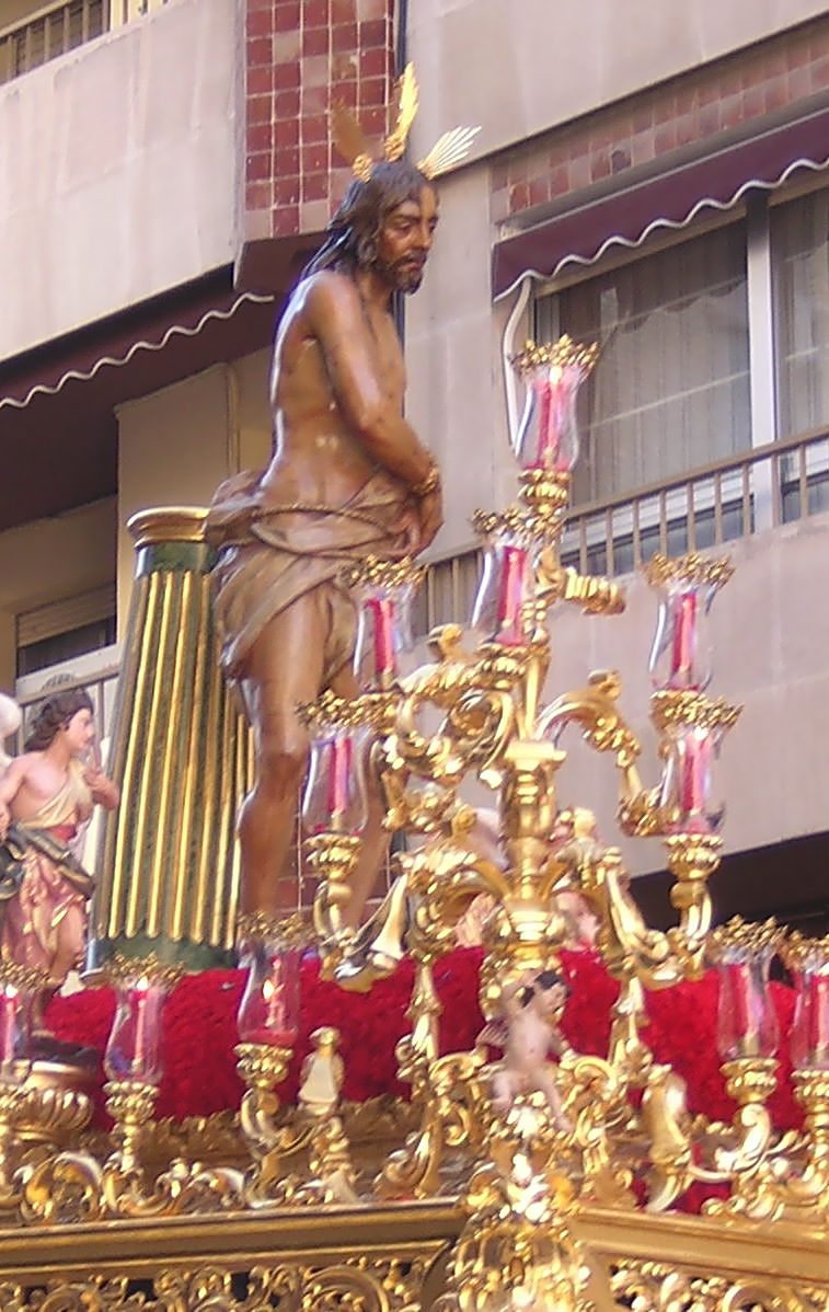 Jesús del perdón en su paso procesional el Miércoles Santo de 2007.